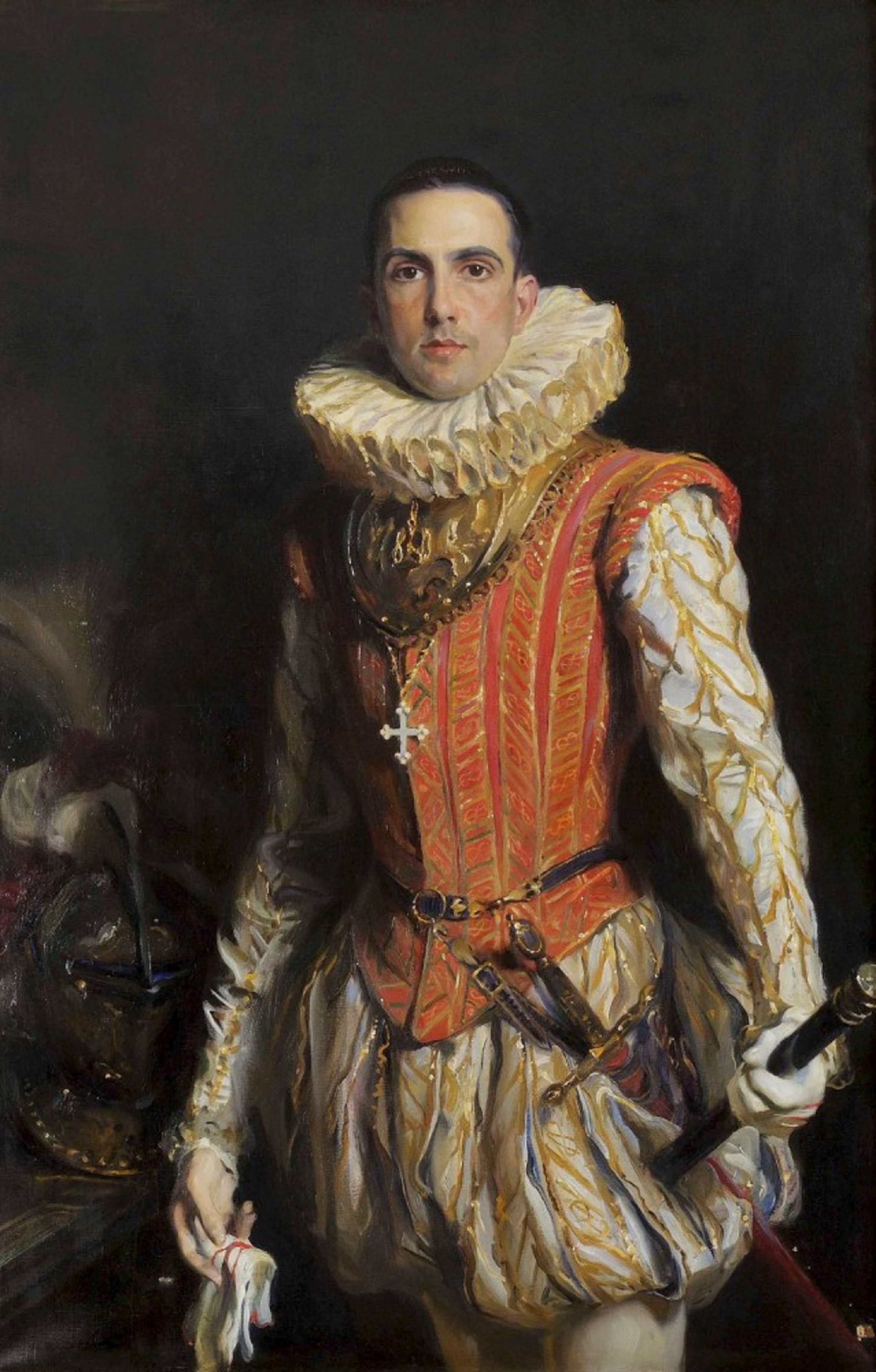 Prince Umberto of Savoy, Prince of Piedmont (King Umberto II of Italy)